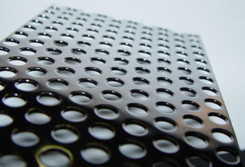 Lochblech